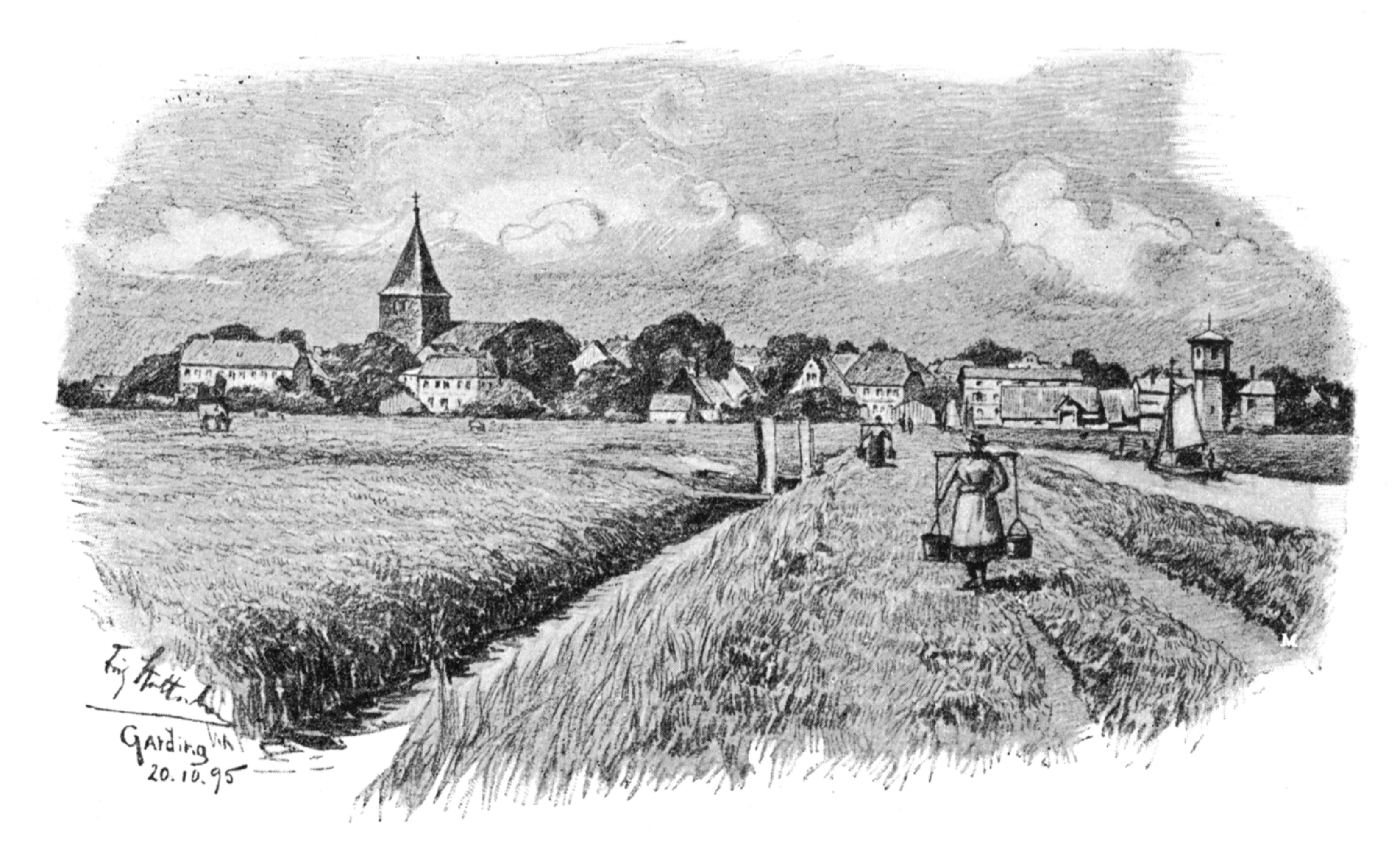 Garding mit der Süderbootfahrt, Zeichnung von Fritz Stoltenberg